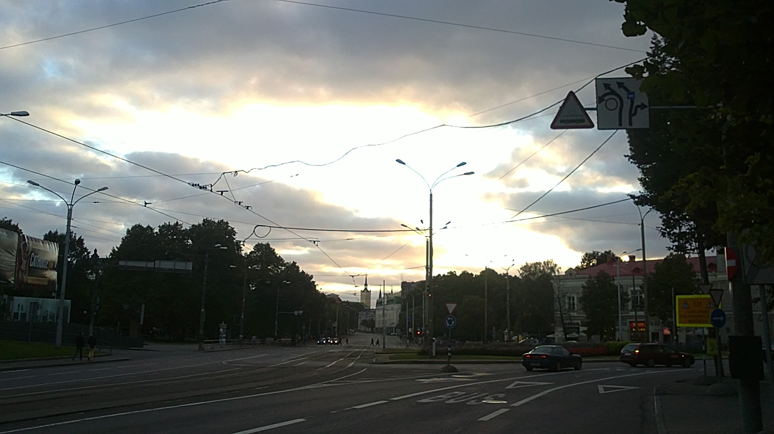 Viru ring Tallinna kesklinnas